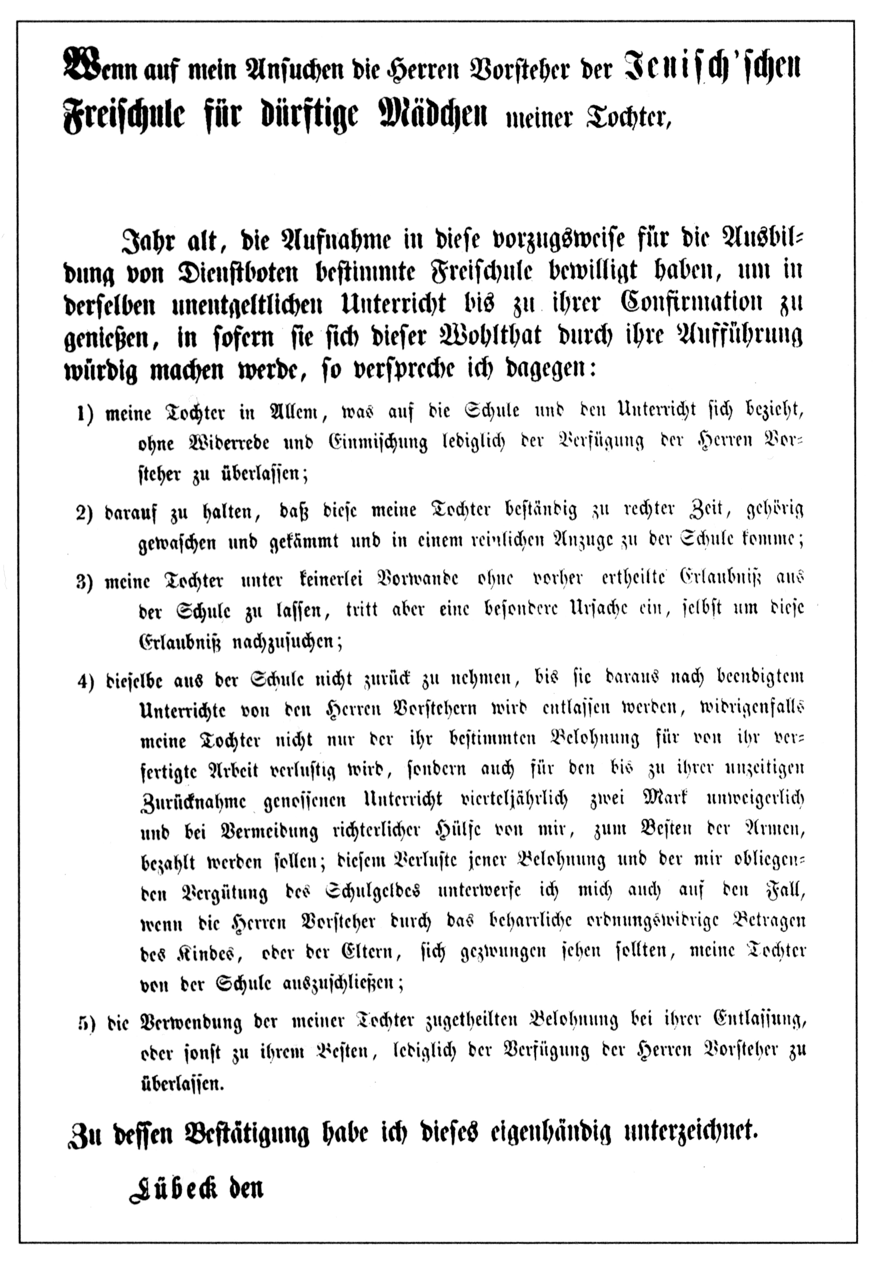 Aufnahmeantrag (Vordruck) für die Aufnahme in die Jenisch'sche Freischule für dürftige Mädchen in Lübeck